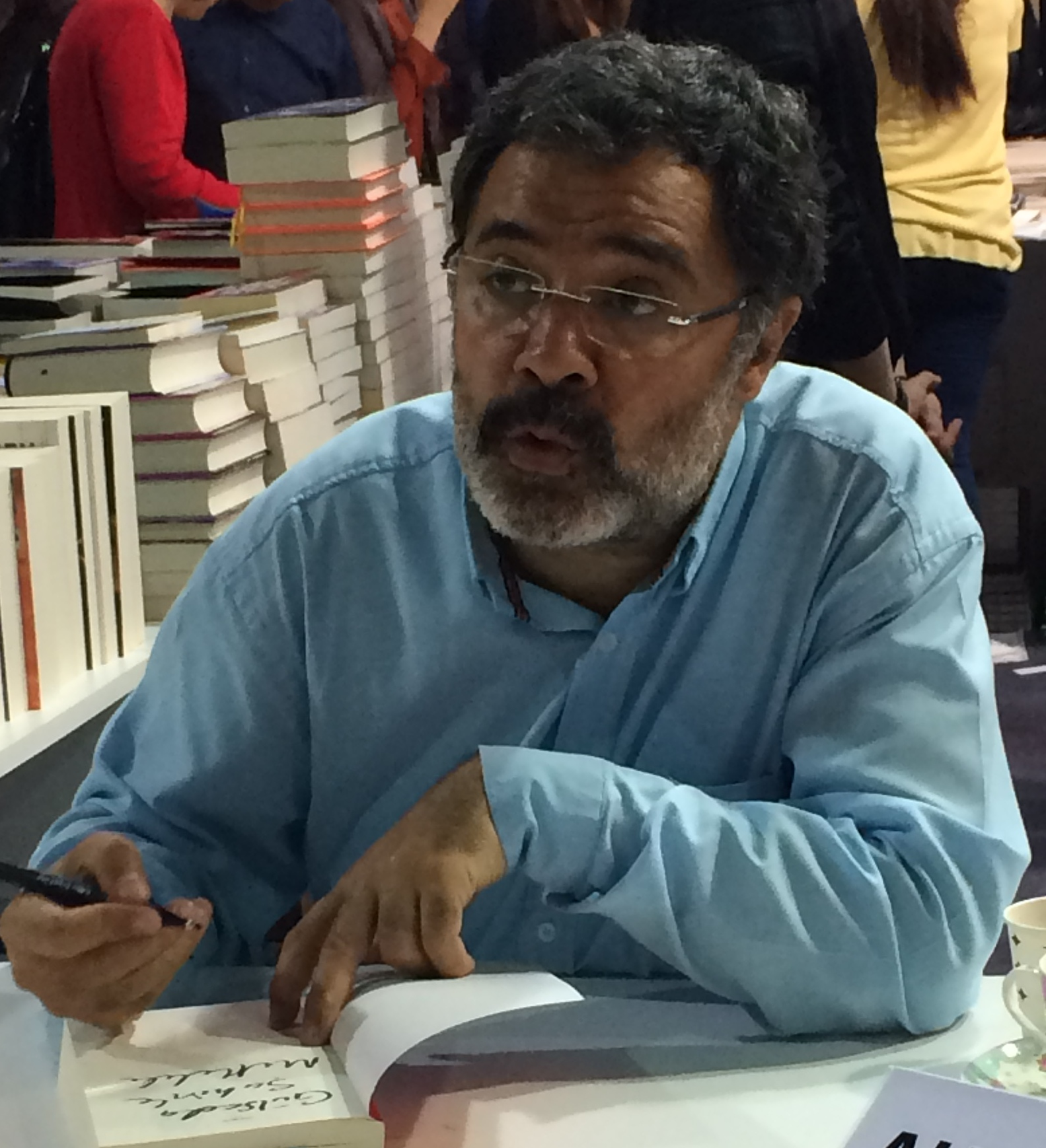 Ahmet Ümit at Kocaeli Book Exhibition, May 2016